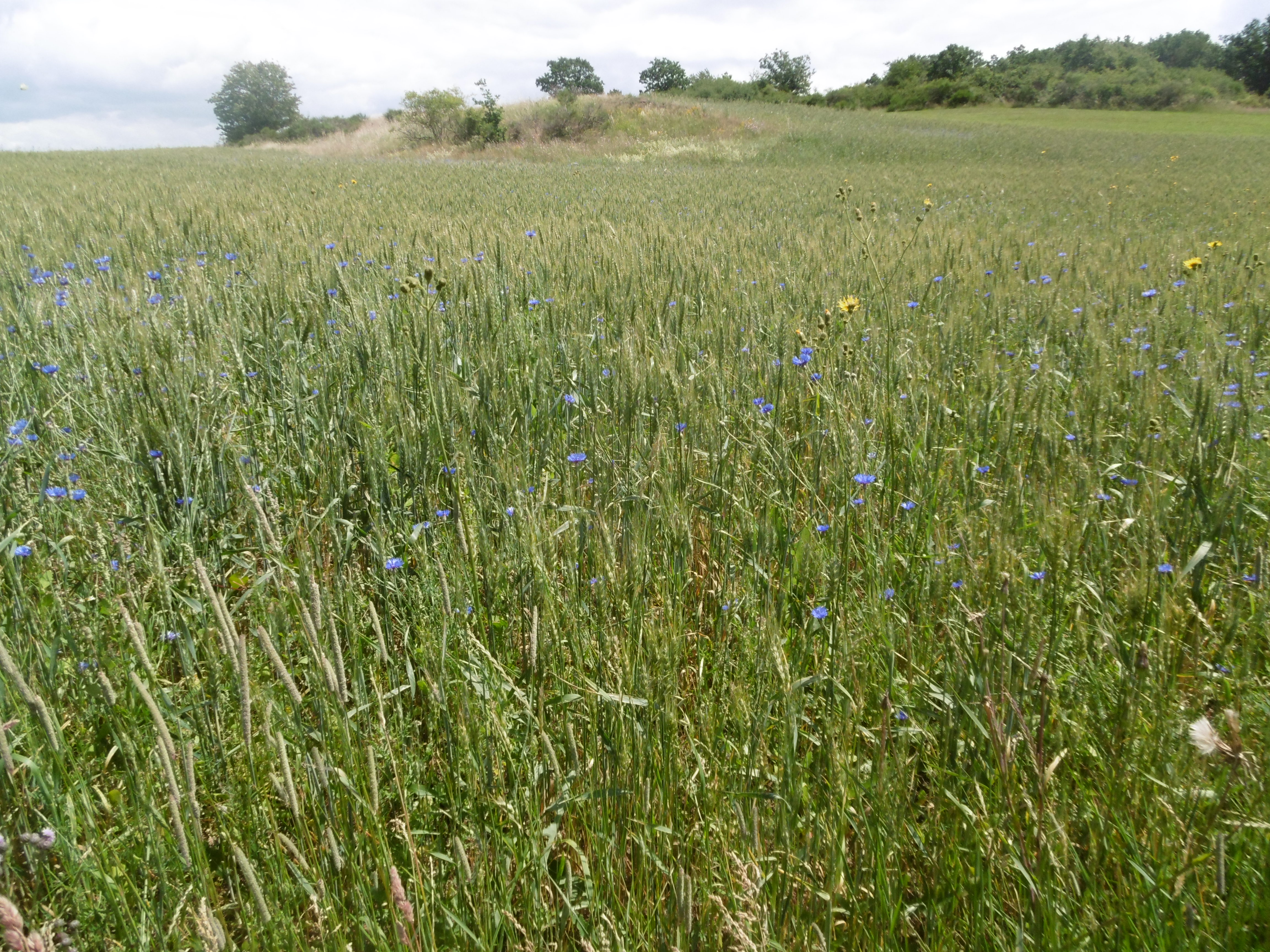 Gerstenacker mit Kornblumen im Naturschutzgebiet Auf dem Knapp.